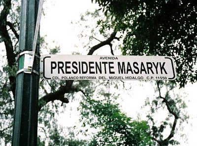 Foto de la placa del nombre de la Avenida Presidente Masaryk